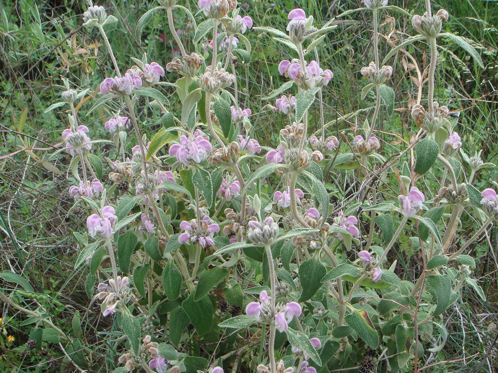 Phlomis purpurea, Norte de Sevilla, España